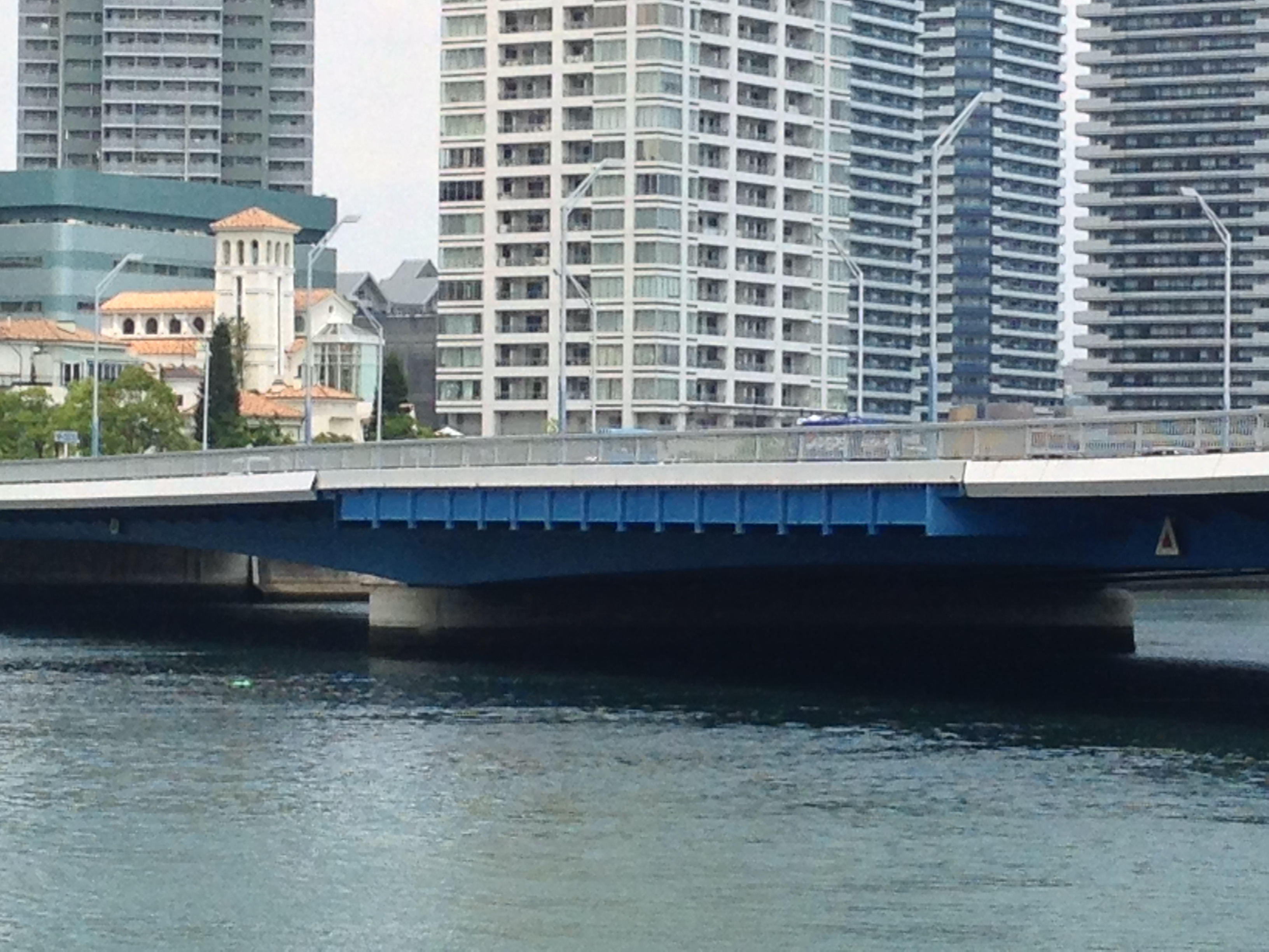 みなとみらい大橋の西側側面中央付近は将来の「栄本町線支線1号」の整備の準備として、鉄骨がむき出しになっている。